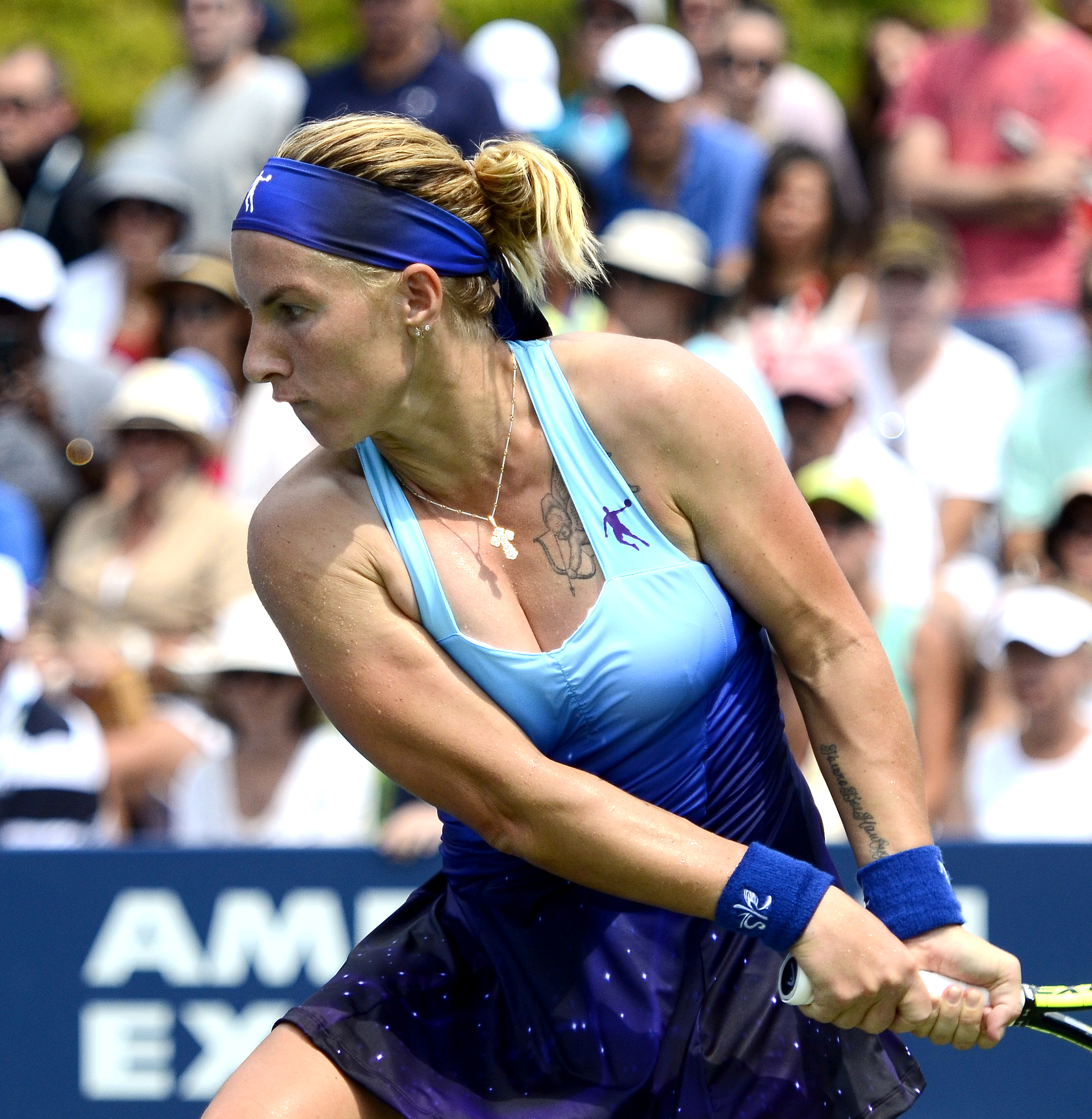 August 26, 2014 Queens, NY Marina Erakovic (NZL) def. Svetlana Kuznetsova (RUS)